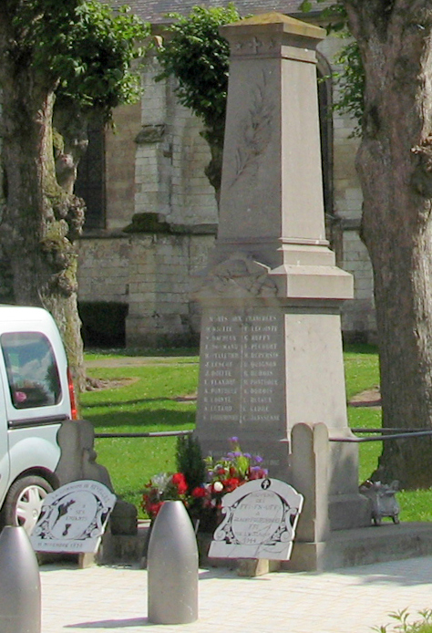 Revelles Somme, Fr, monument-aux-morts.